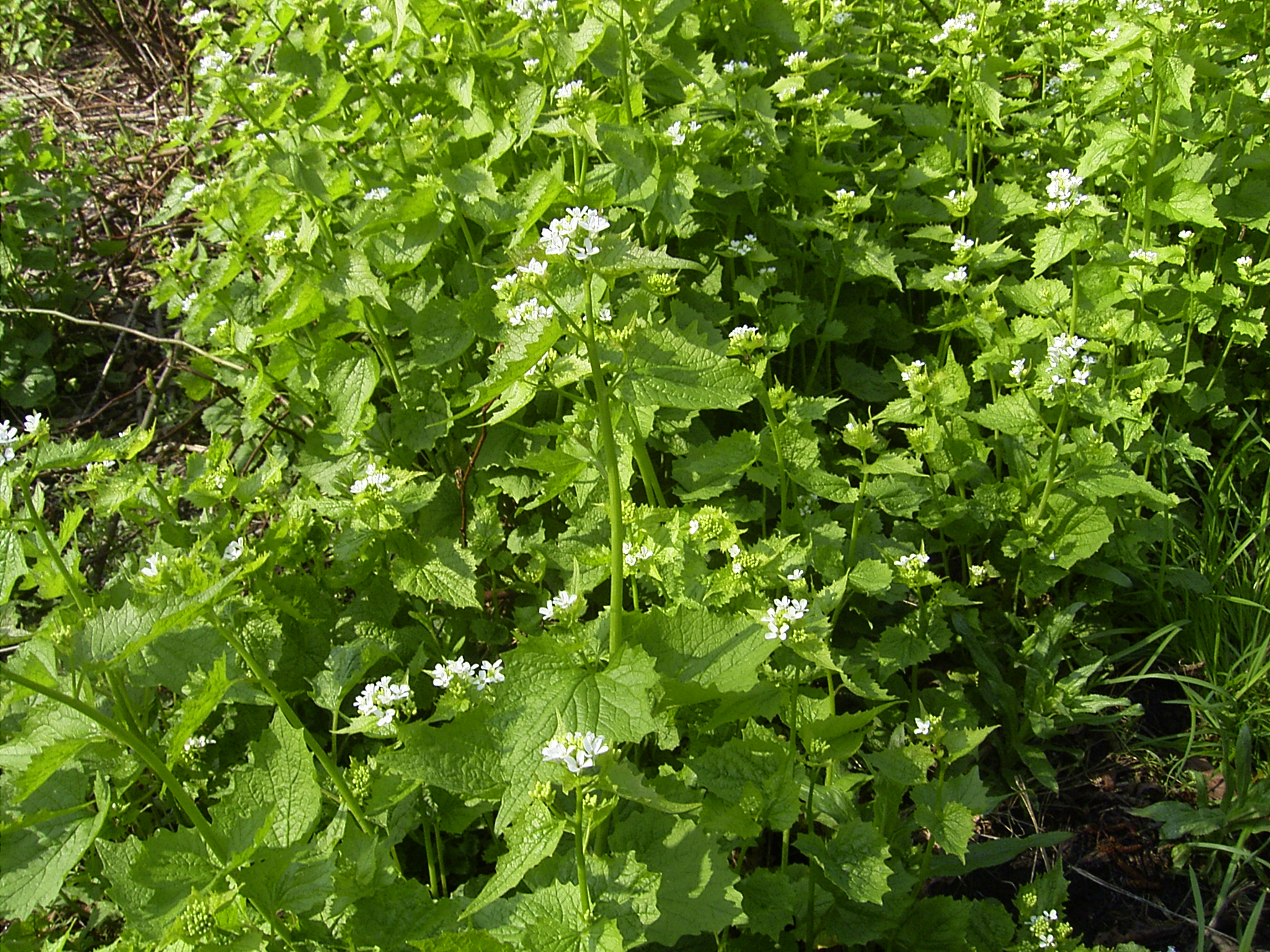 gouda, eigen foto, hiermee onder gnu/fdl gebracht